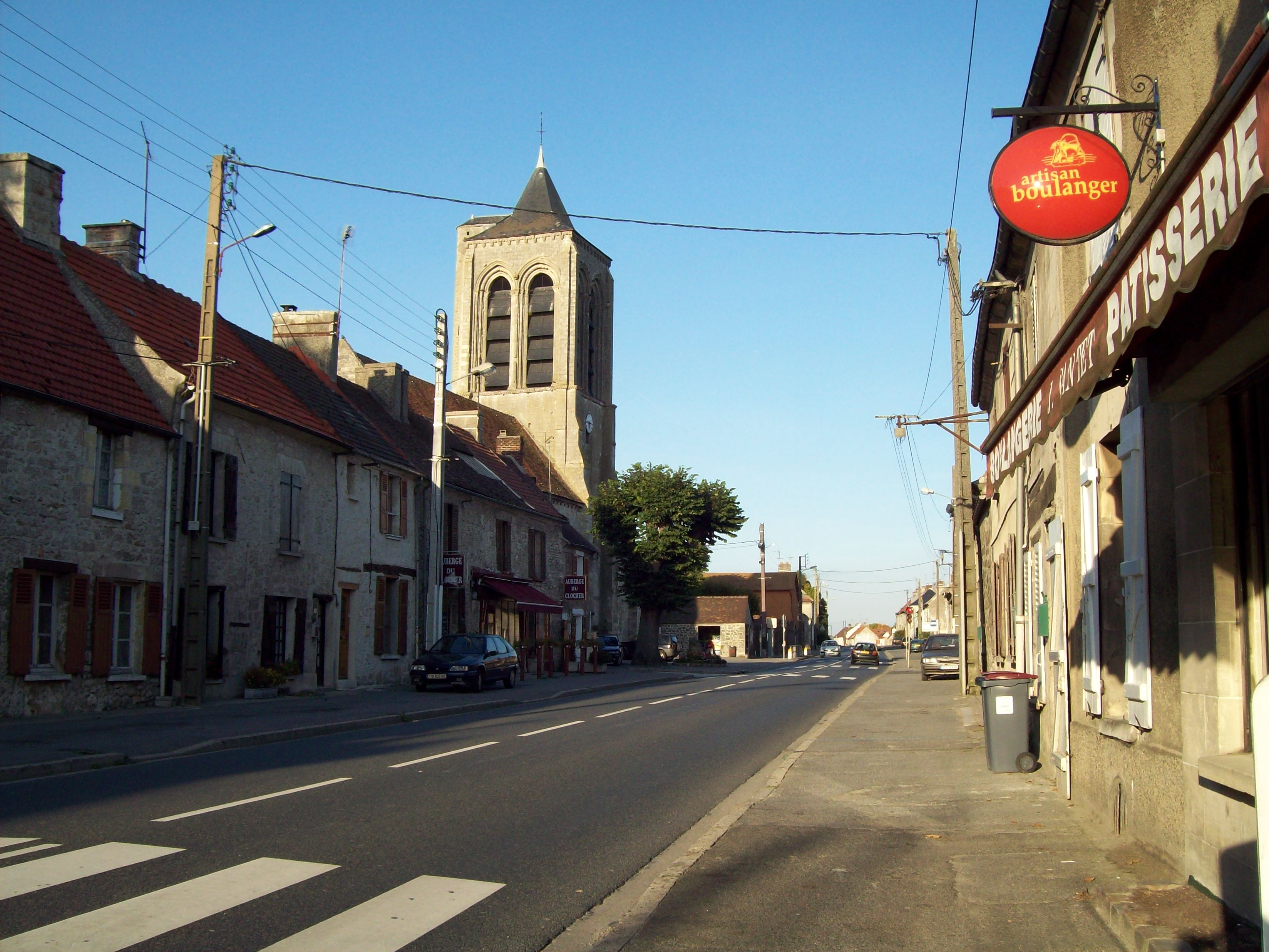 Route principale qui traverse Villeneuve-sur-Verberie